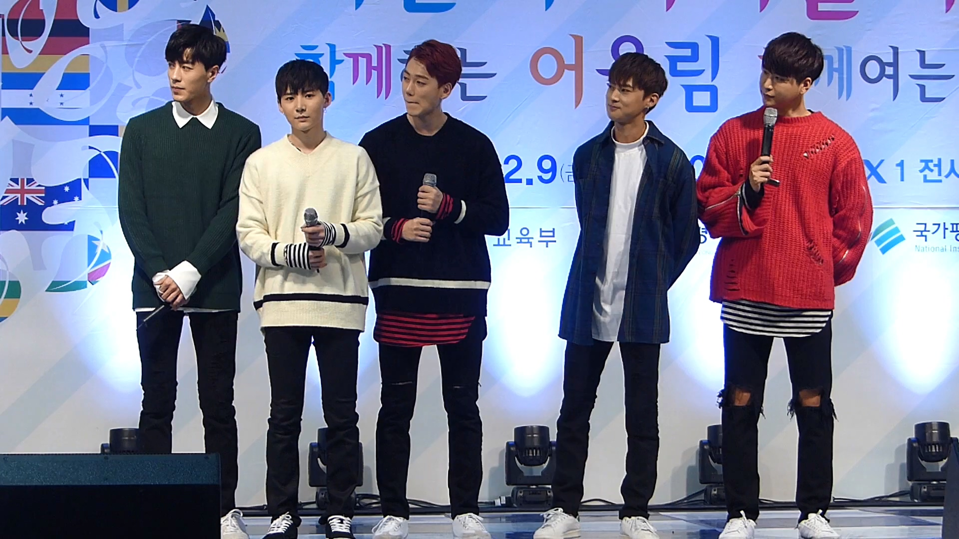 161209 킨텍스 VAV 직캠 다문화 너나들이 축제 경기방송 바운스바운스 18m20s